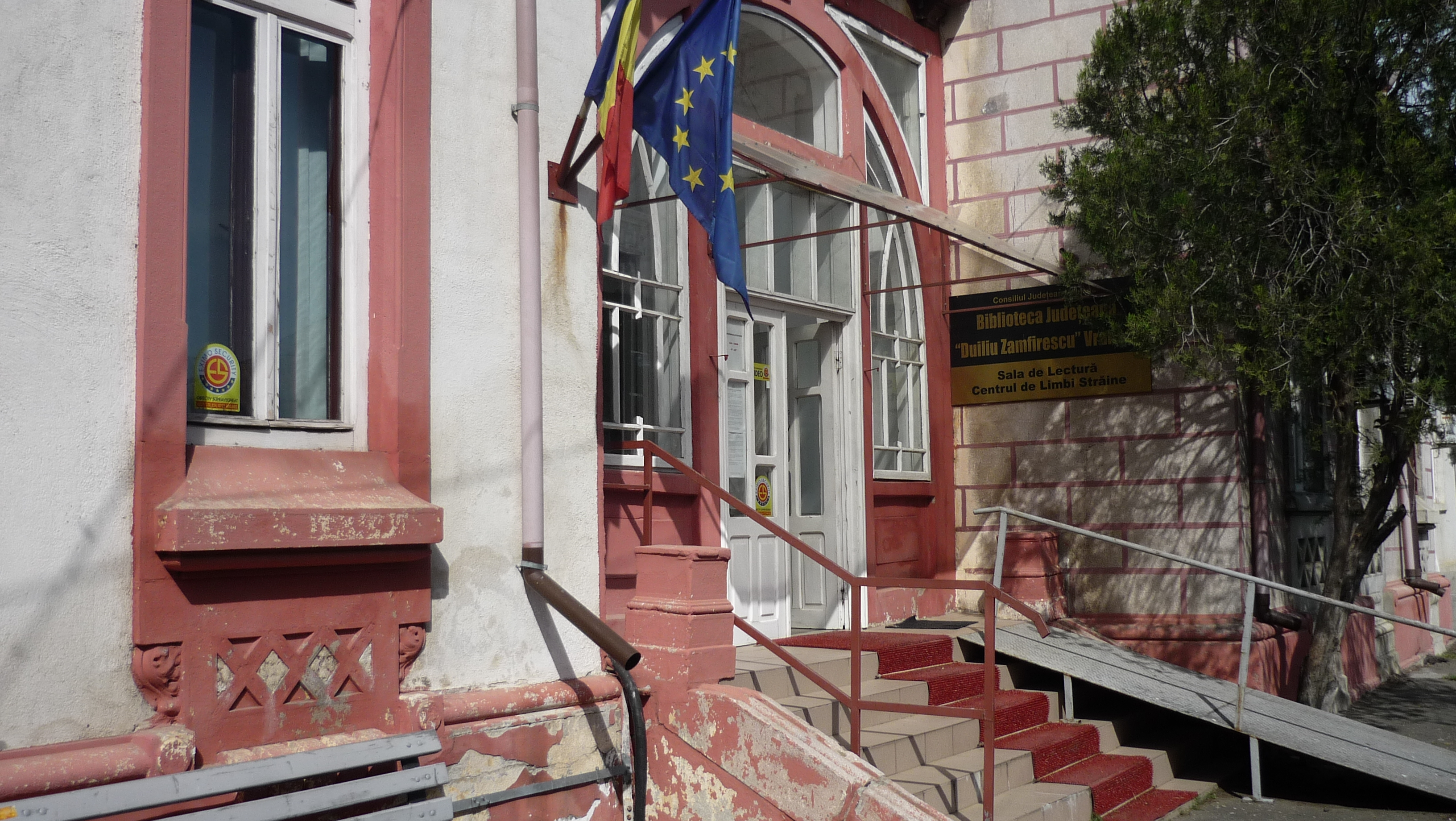 Biblioteca Județeană „Duiliu Zamfirescu” Vrancea - str. Maior Sava